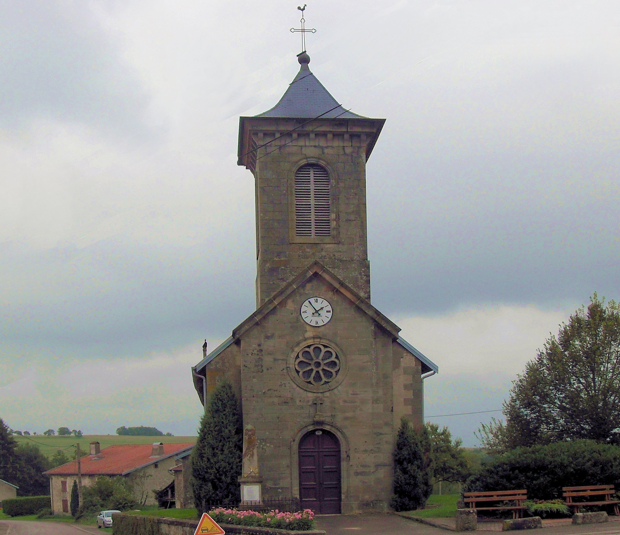 L'église Sainte-Madeleinede Pierrefitte